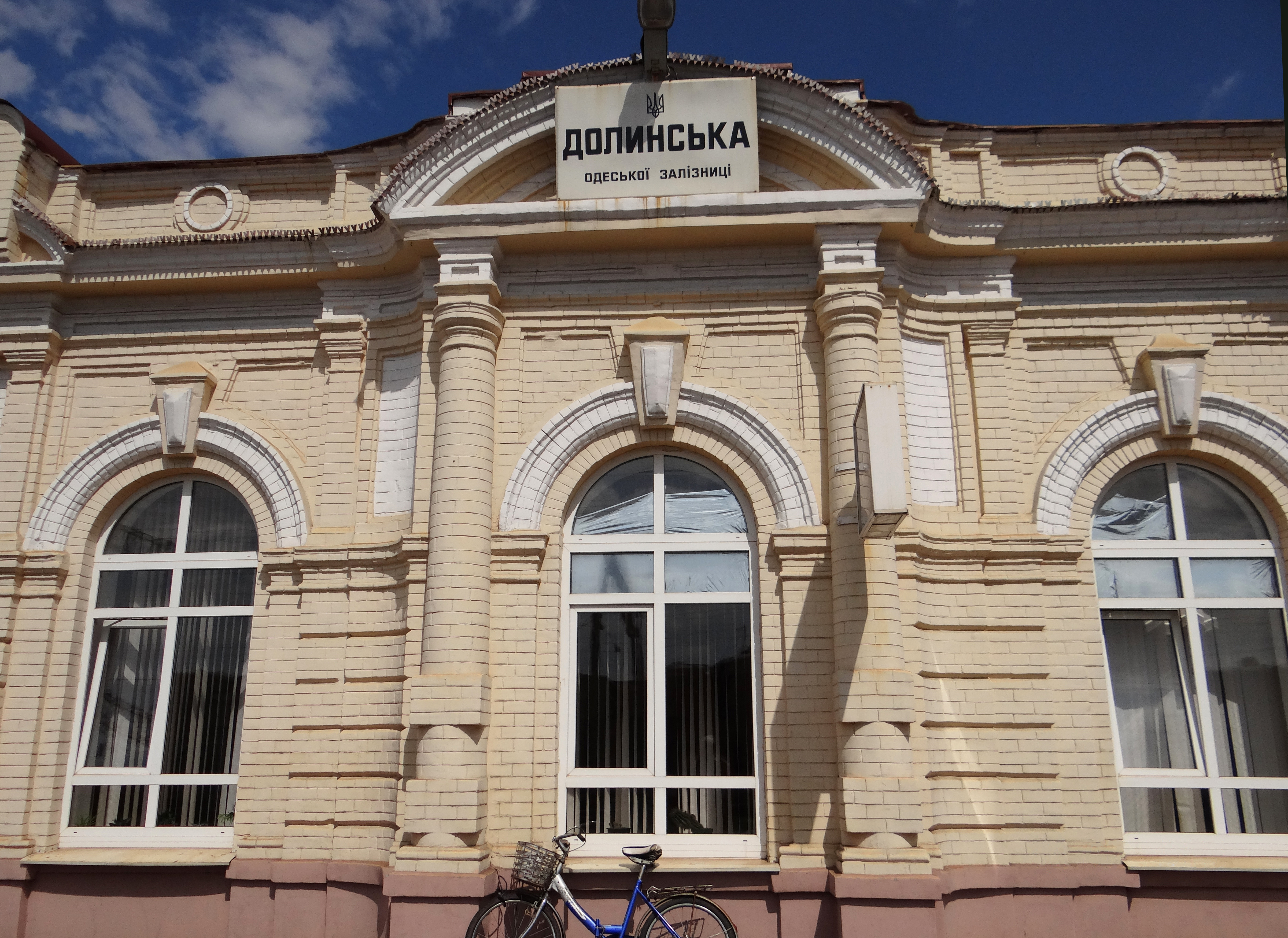 Долинська